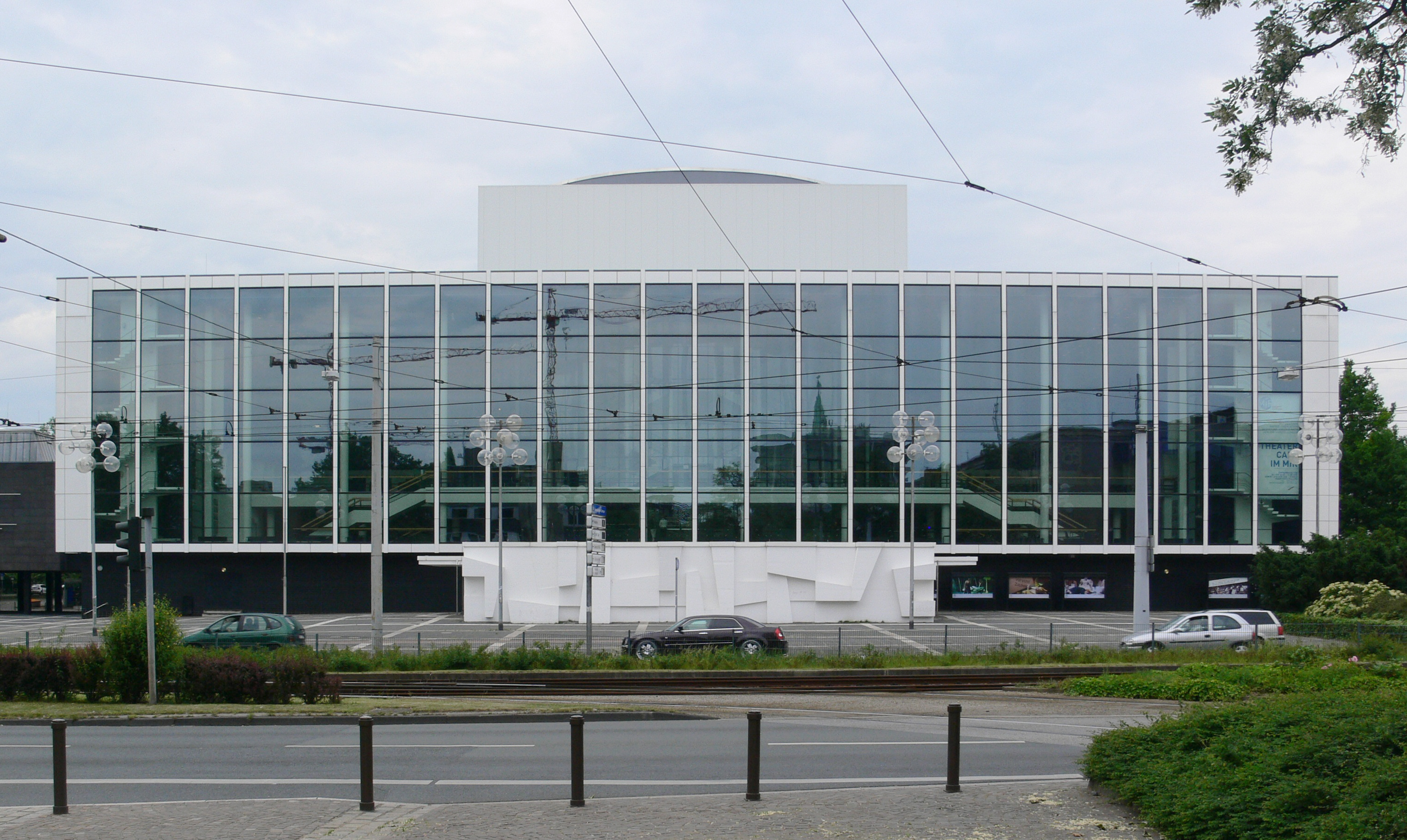 Gelsenkirchen, Musiktheater im Revier